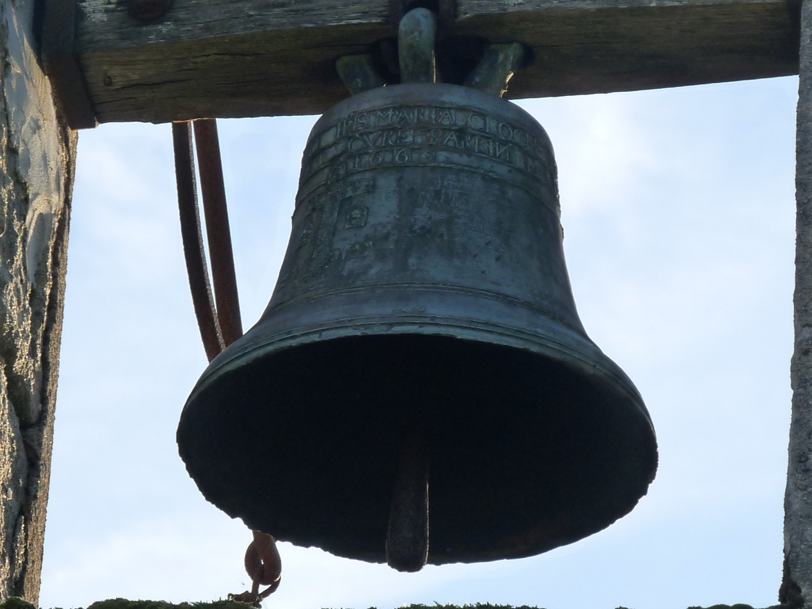 Cloche de 1665, église de Jussas, Charente-Maritime, France